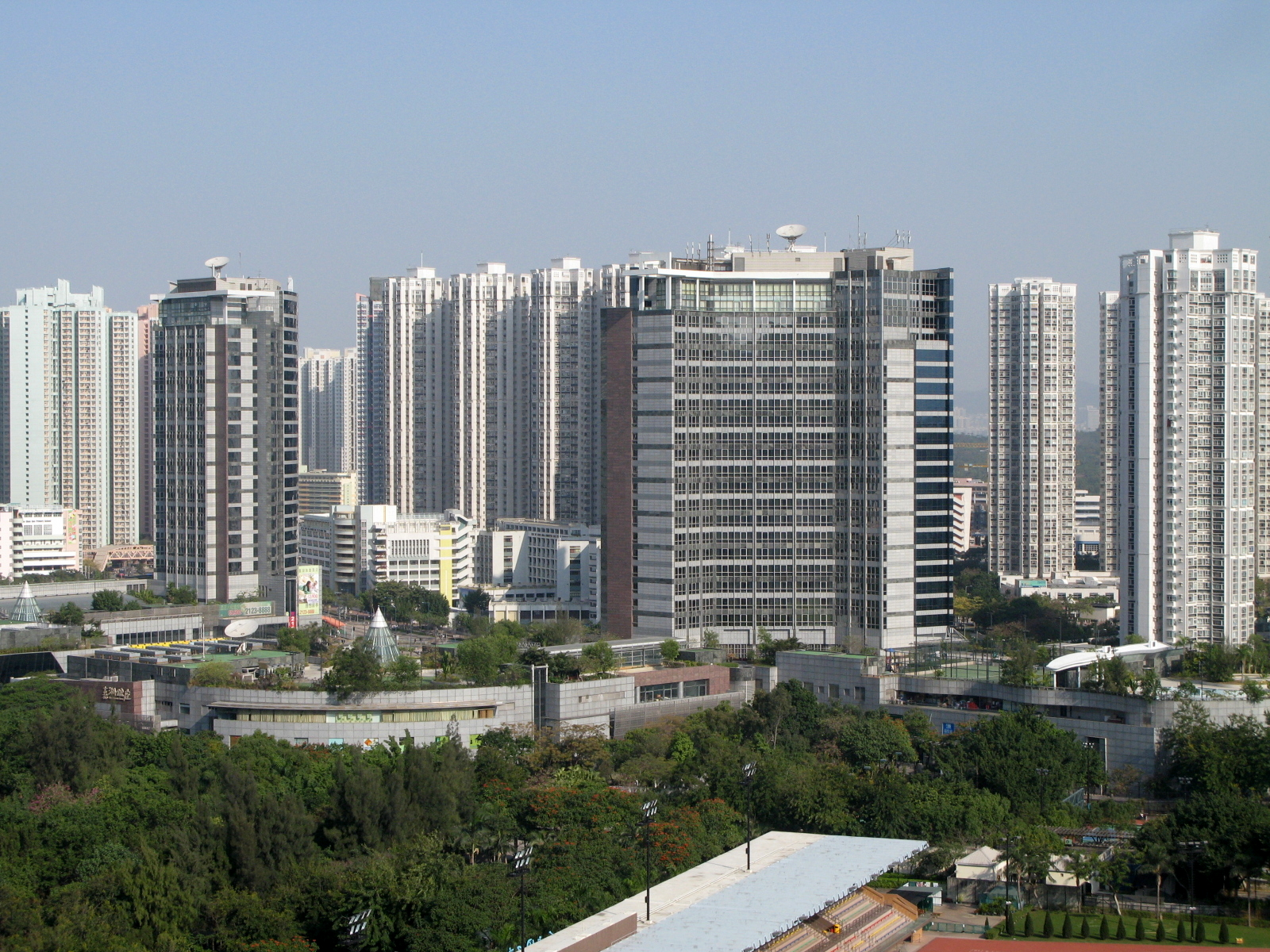 HK Kingswood Ginza